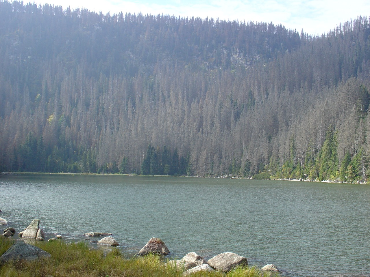 Foto vom Plöckensteinsee